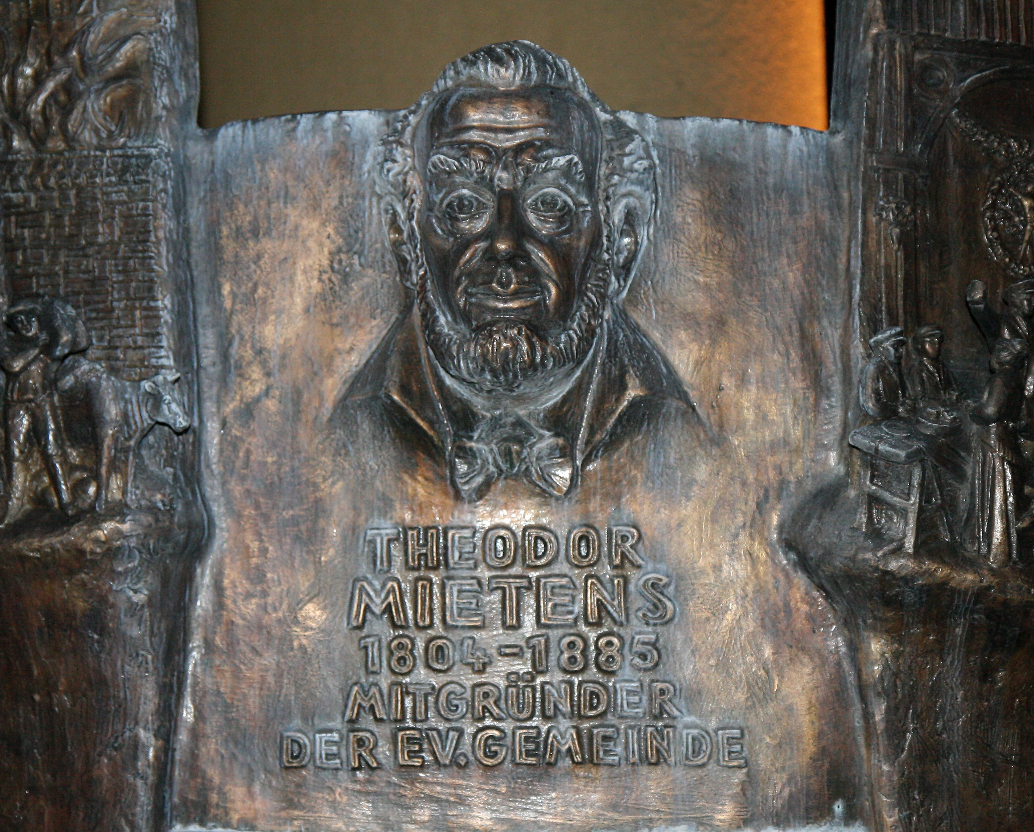 Geschichtsbrunnen am Kurkölner Platz in Olpe. Relief Theodor Mietens.